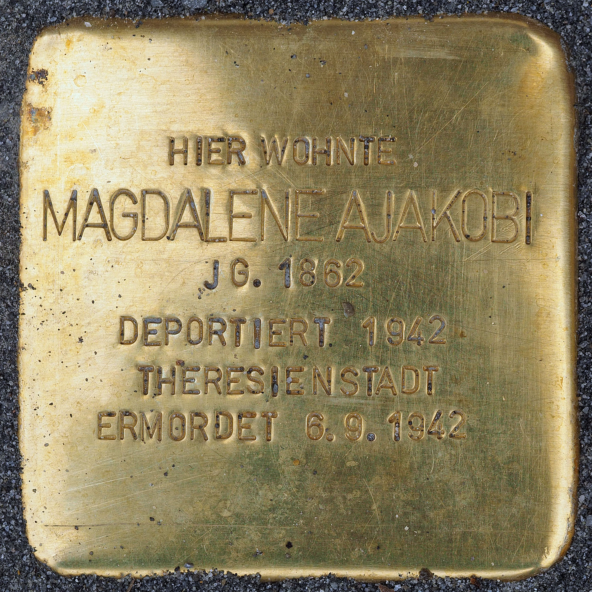 Stolpersteine Kempen: Ajakobi, Magdalene